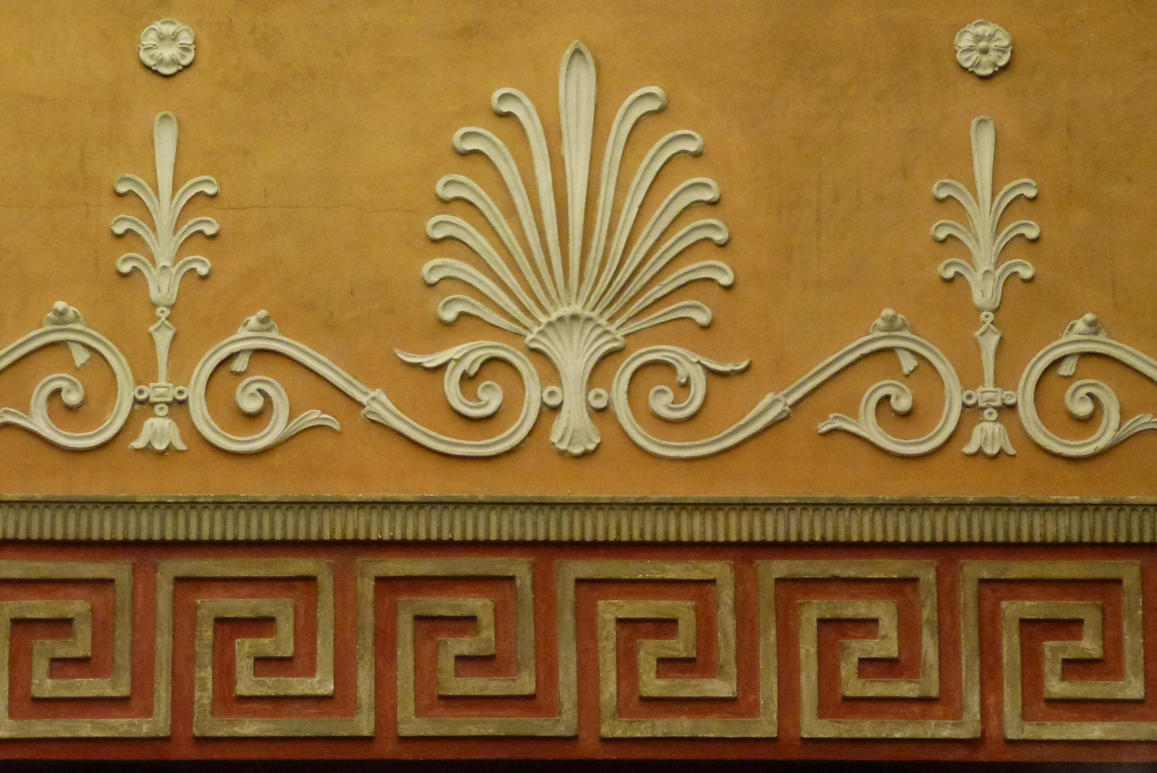 Metropolpalatset interiör